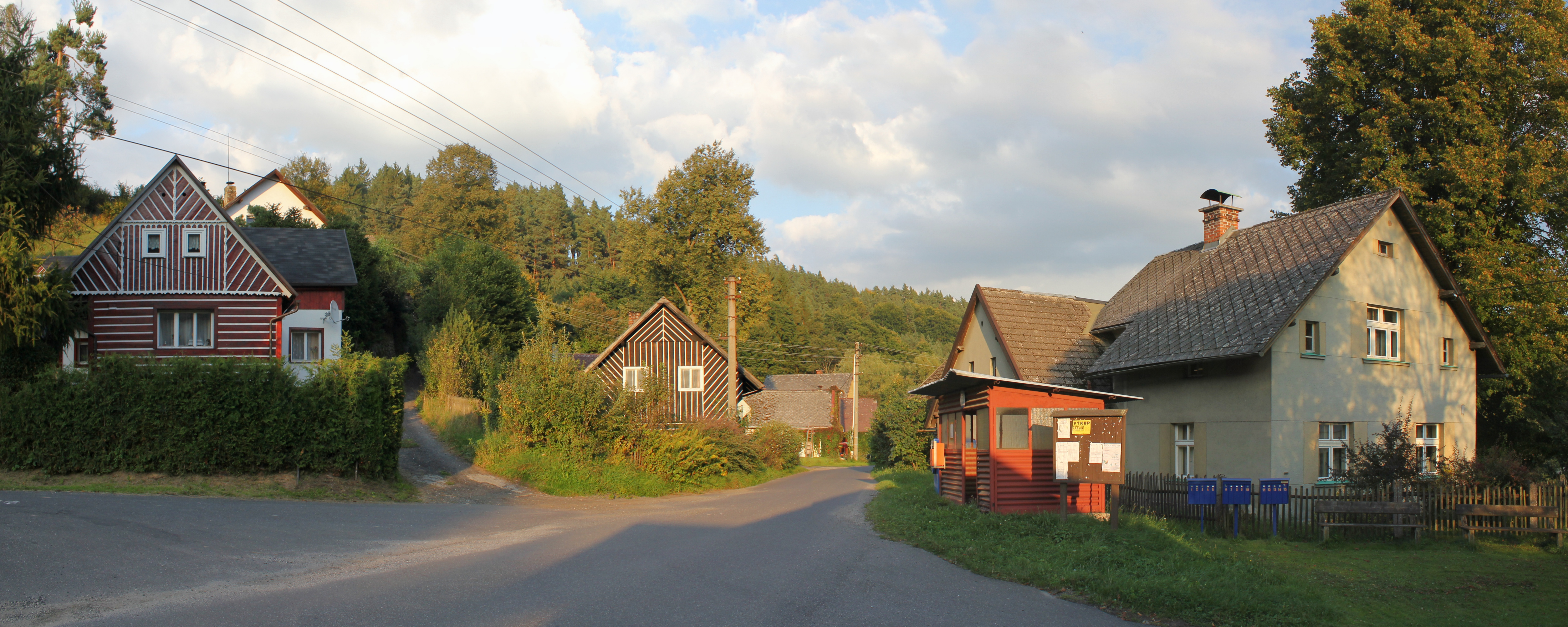 Třtí